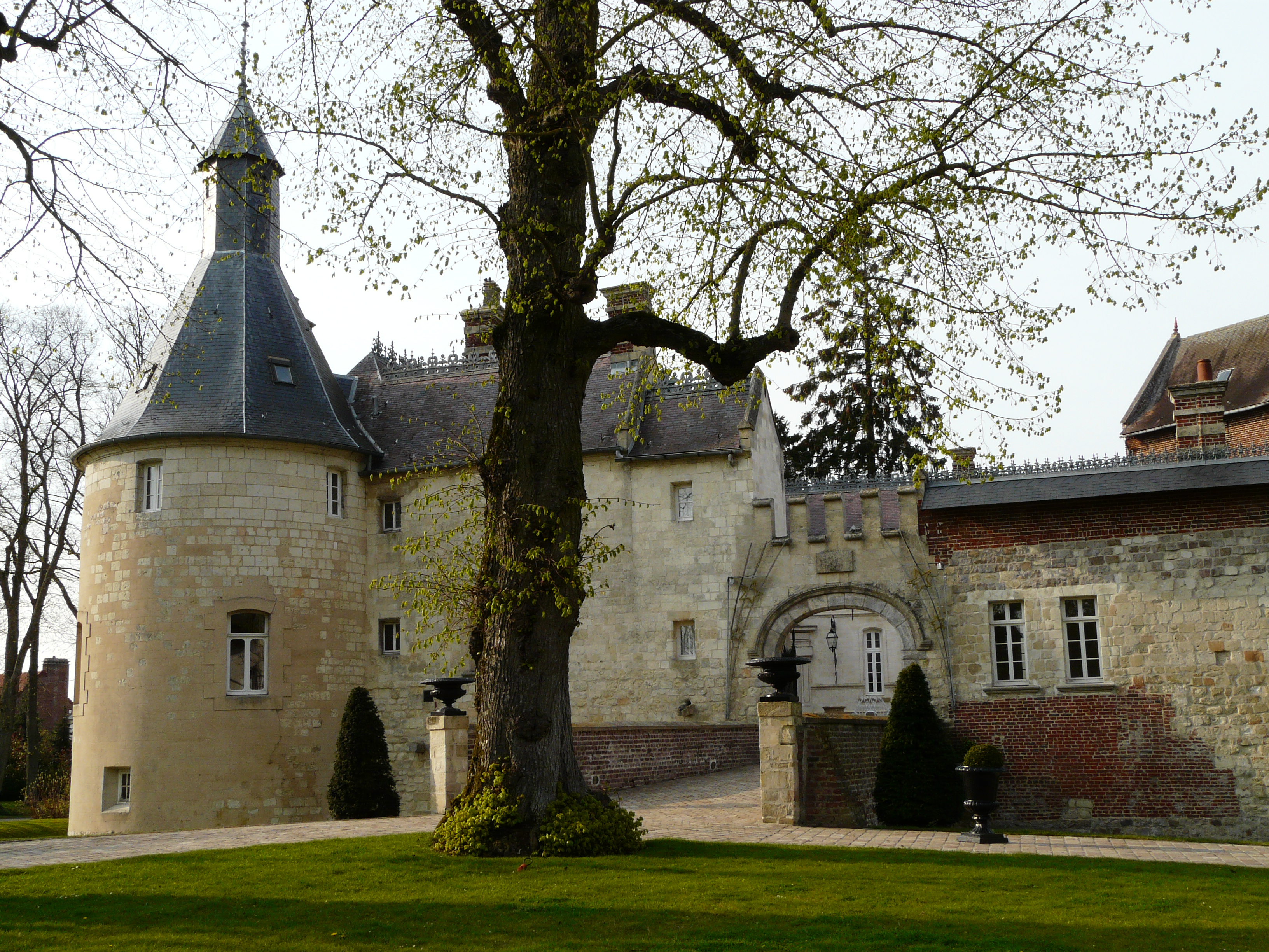 Le château de Ligny-en-Cambrésis (Nord)